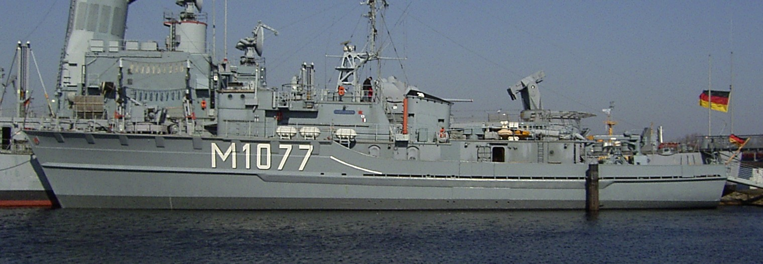 Deutsche Bundesmarine, Minensuchboot M1077 "Weilheim" der Lindau-Klasse (320 später 331), ausgestellt im Deutschen Marinemuseum Wilhelmshaven (im Hintergrund Zerstörer "Mölders")